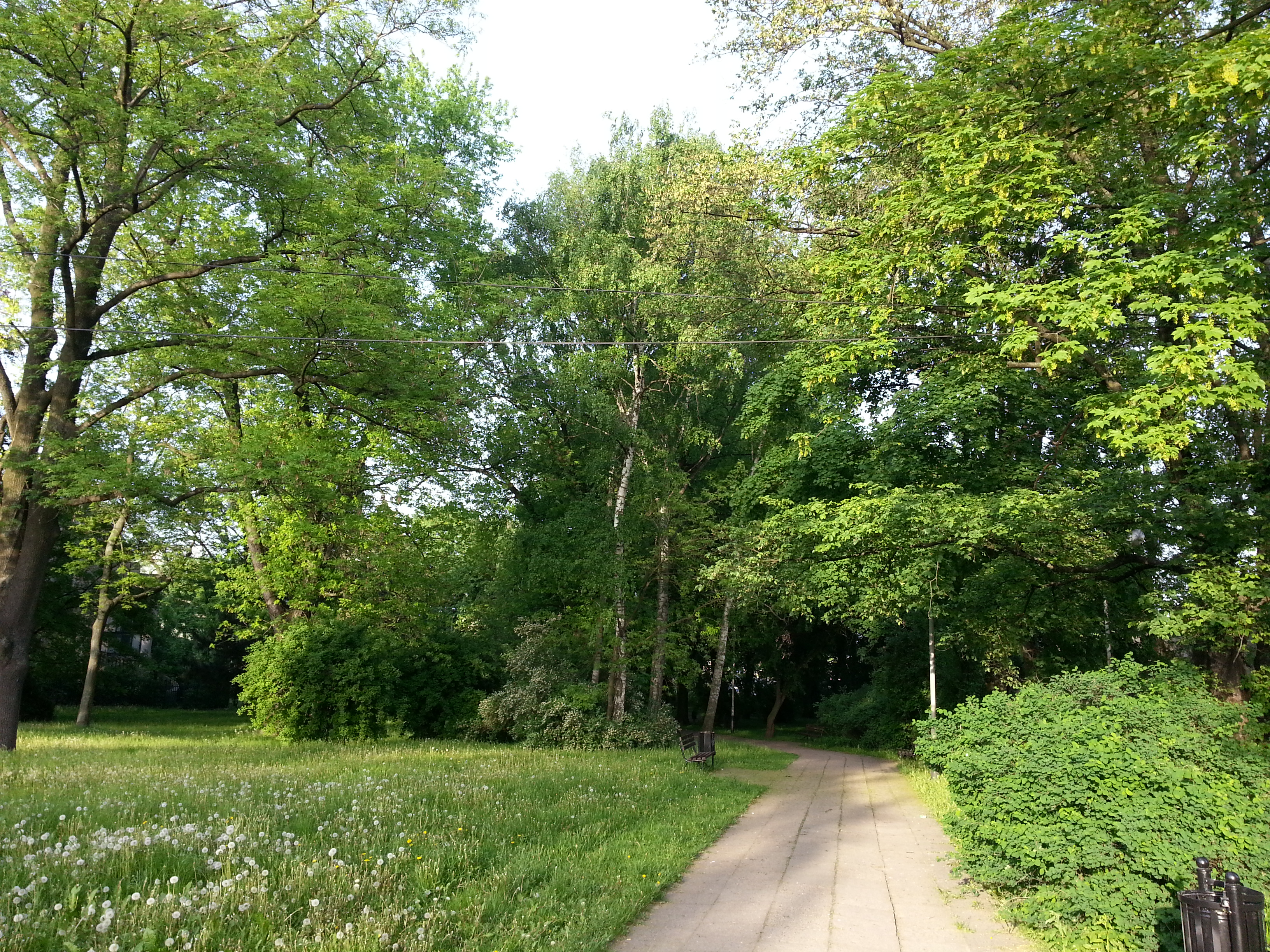 Widok parku od ulicy Inżyniera Stefana Skrzywana.